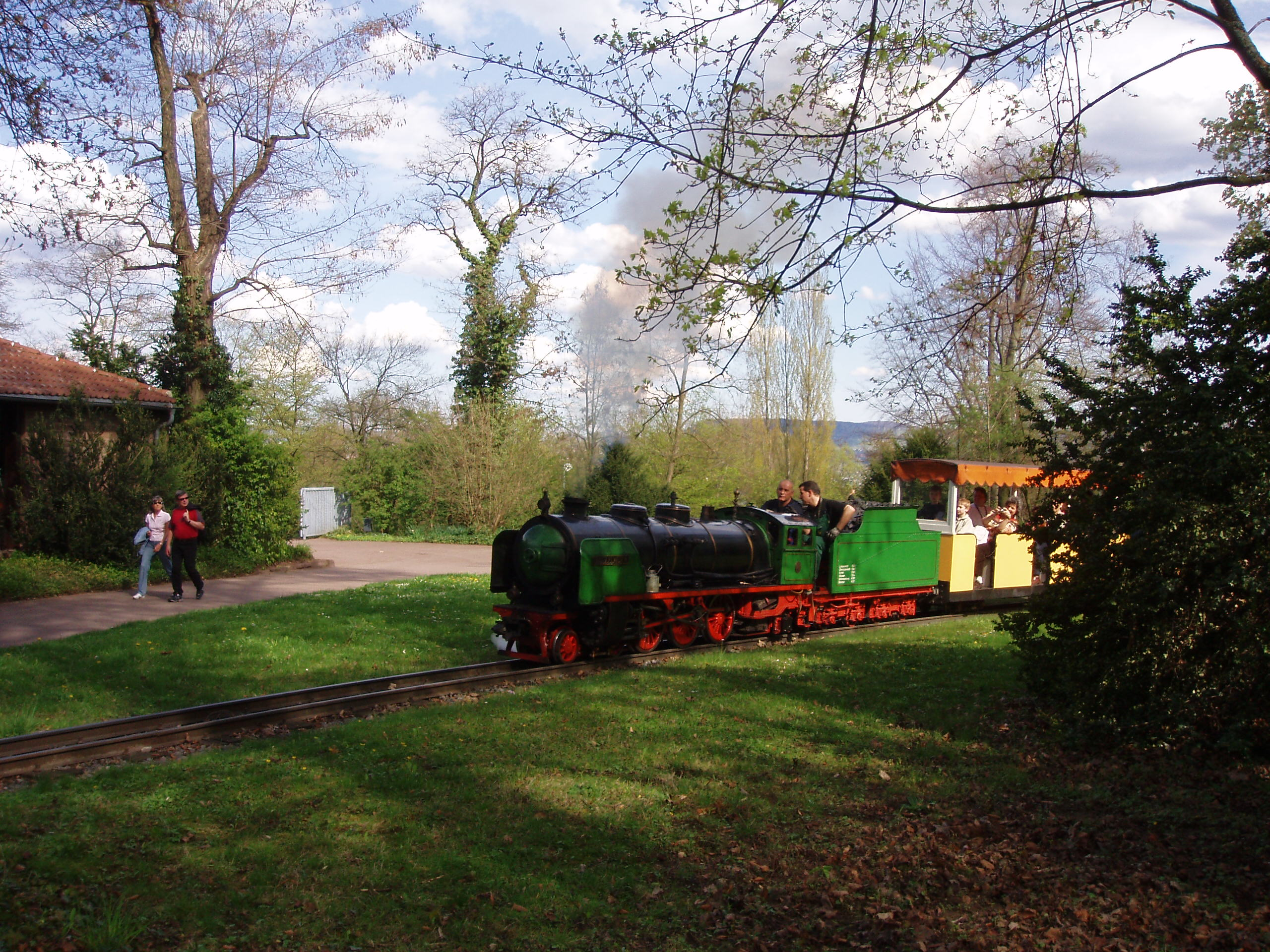 Killesberg